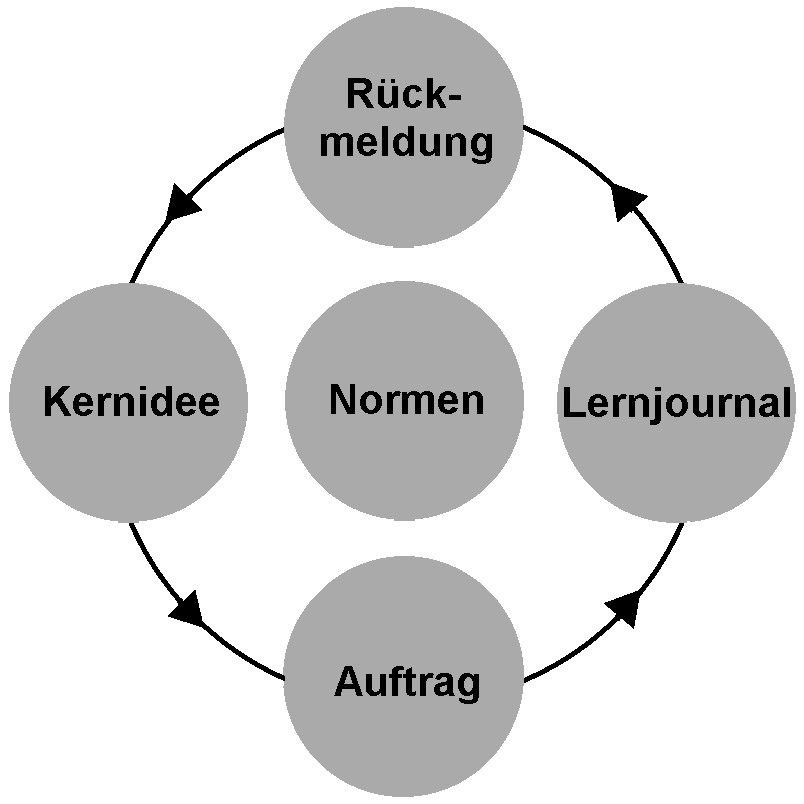 Diese Abbildung veranschaulicht den Kreislauf der Dialogischen Didaktik, wie zb beschrieben in Ruf, Urs (2010): Das Dialogische Lernmodell vor dem Hintergrund wissenschaftlicher Theorien und Befunde. In: Ruf, Urs et al. (Hrsg.): Besser Lernen im Dialog. Seelze: Kallmeyer Verlag, S. 255.